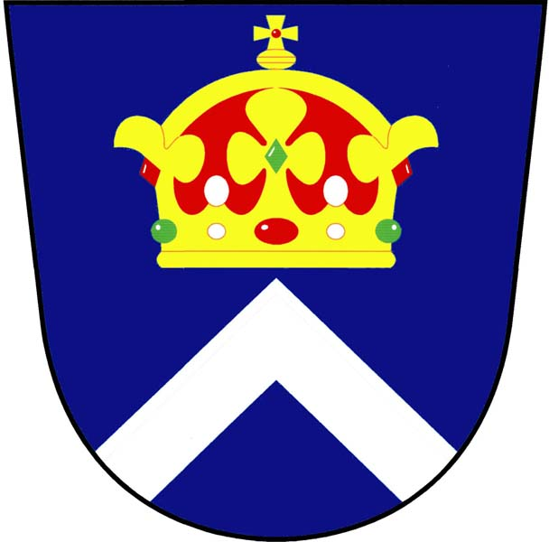 Znak obce Krouna